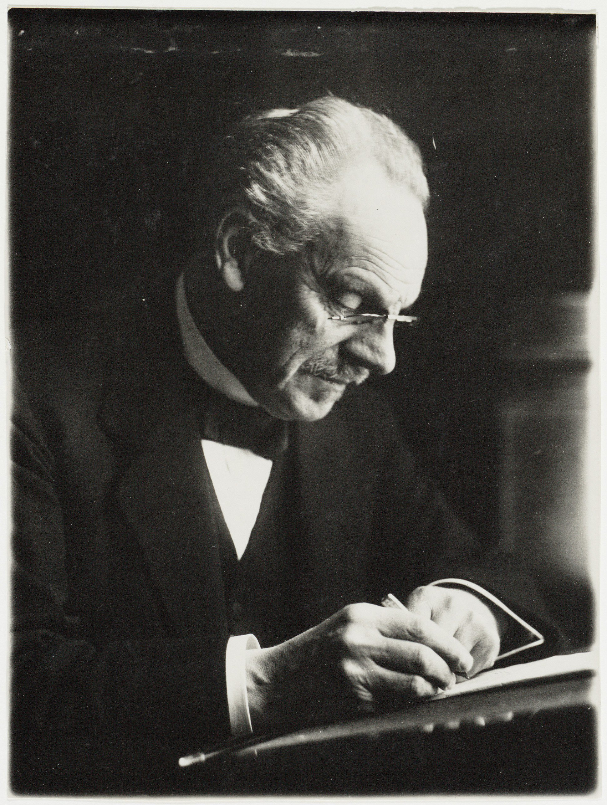 J.W.C. Tellegen (31-05-1859/16-04-1921) Burgemeester.